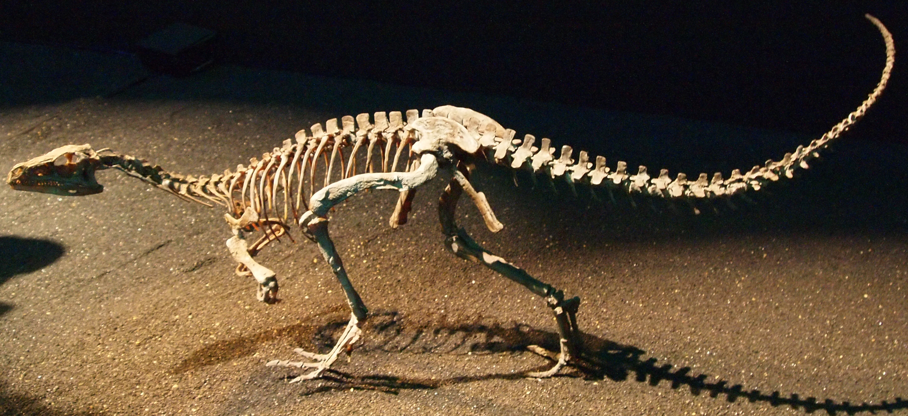 森アーツセンターギャラリー